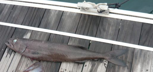 Ölfisch von den Kanarischen Inseln